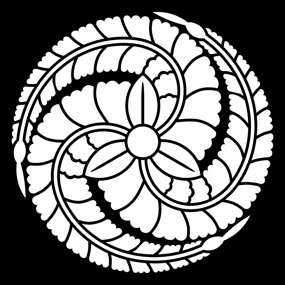 家紋「藤」の一種「黒田藤巴」。黒田官兵衛を排出した福岡藩主黒田氏の定紋として有名。